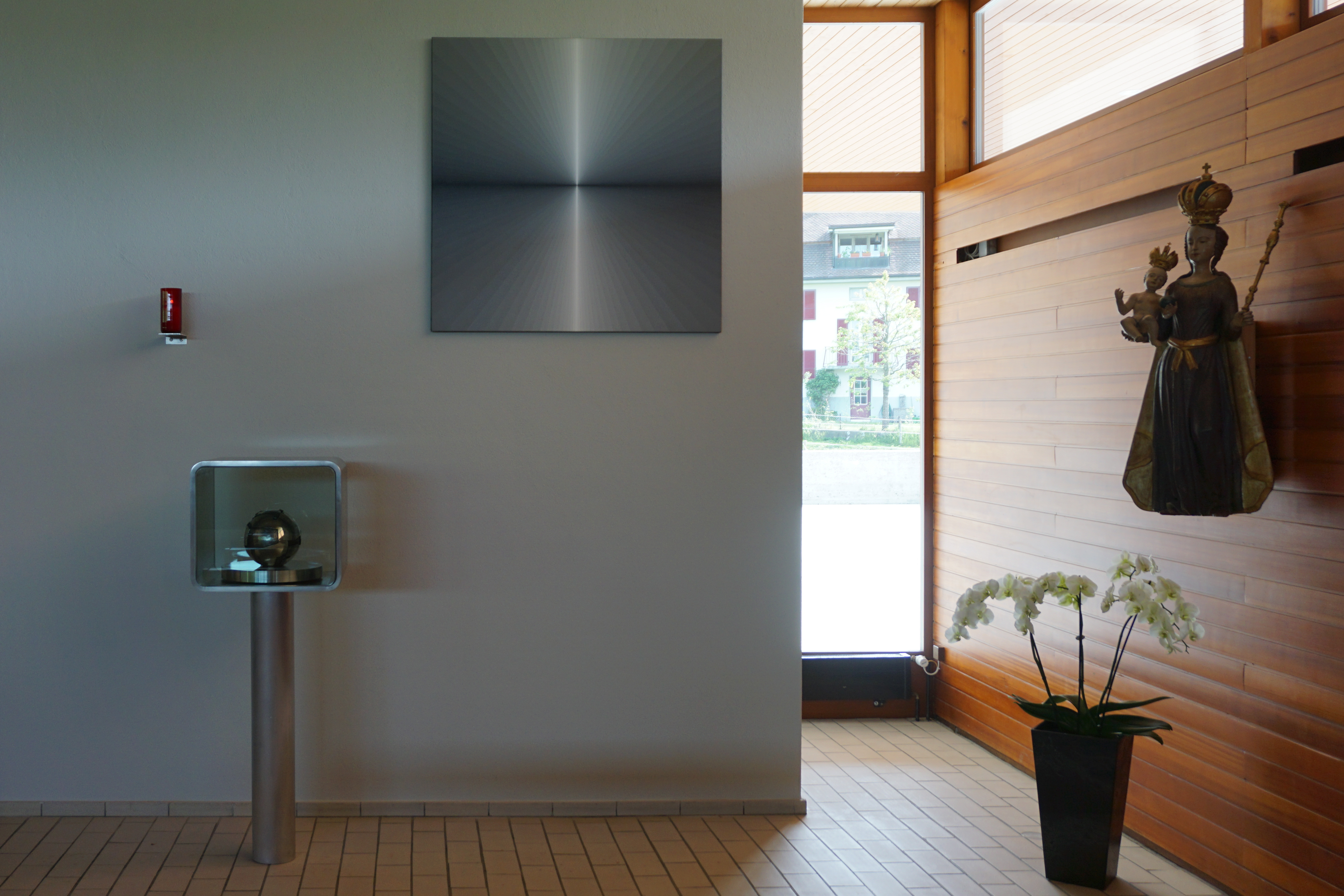 Tabernakel und Marienstatue der St.Johanneskirche